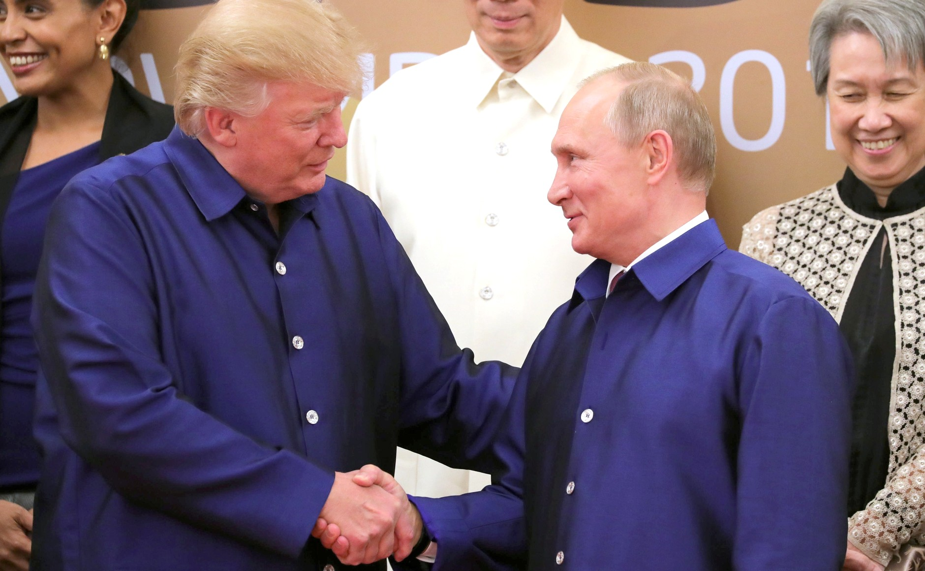 Церемония фотографирования лидеров экономик форума АТЭС. С Президентом США Дональдом Трампом.